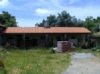 Está en la misma finca que la casa y el alpendre